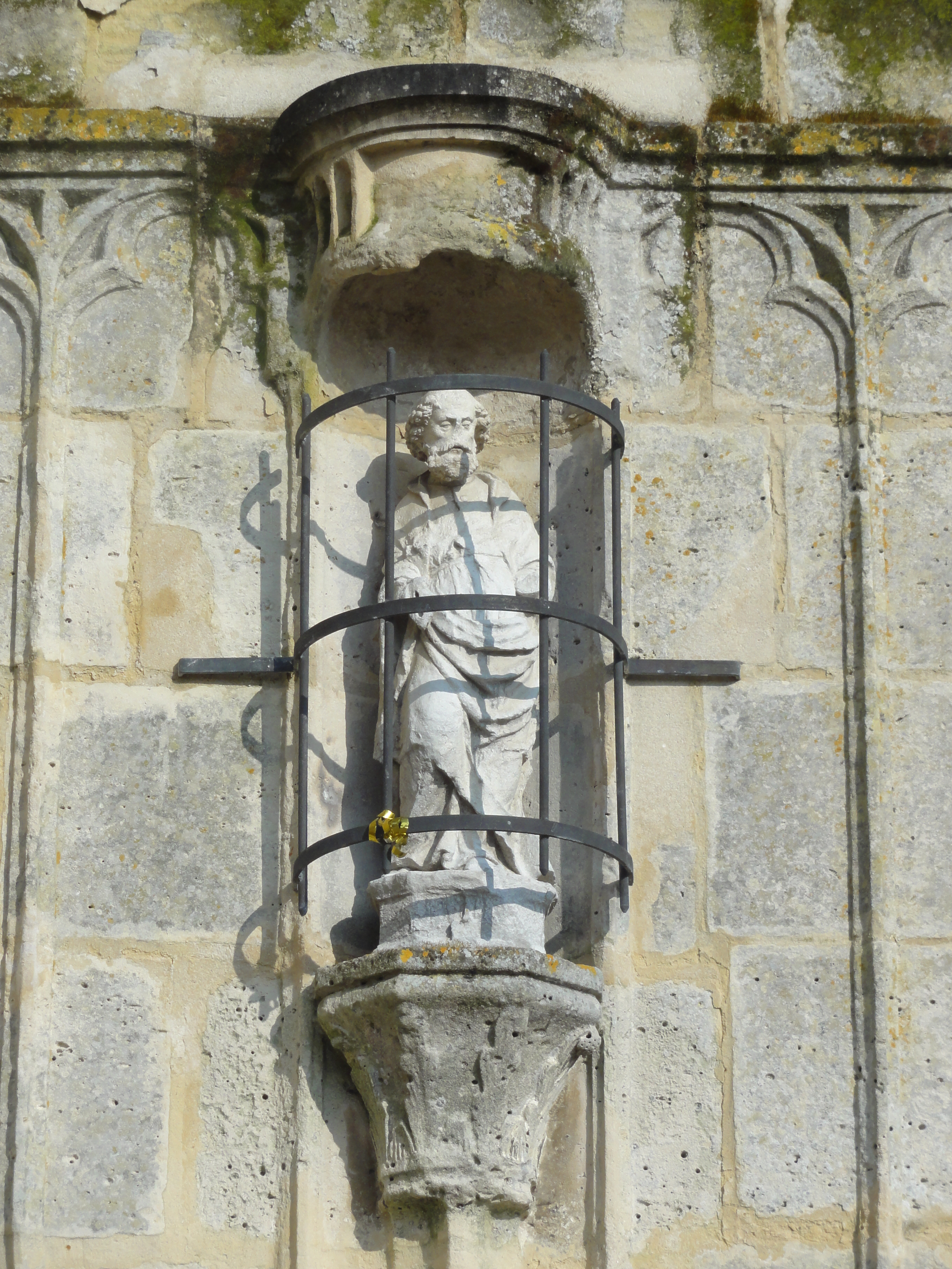 Statue de saint Paul au-dessus du portail, original conservé en mairie.